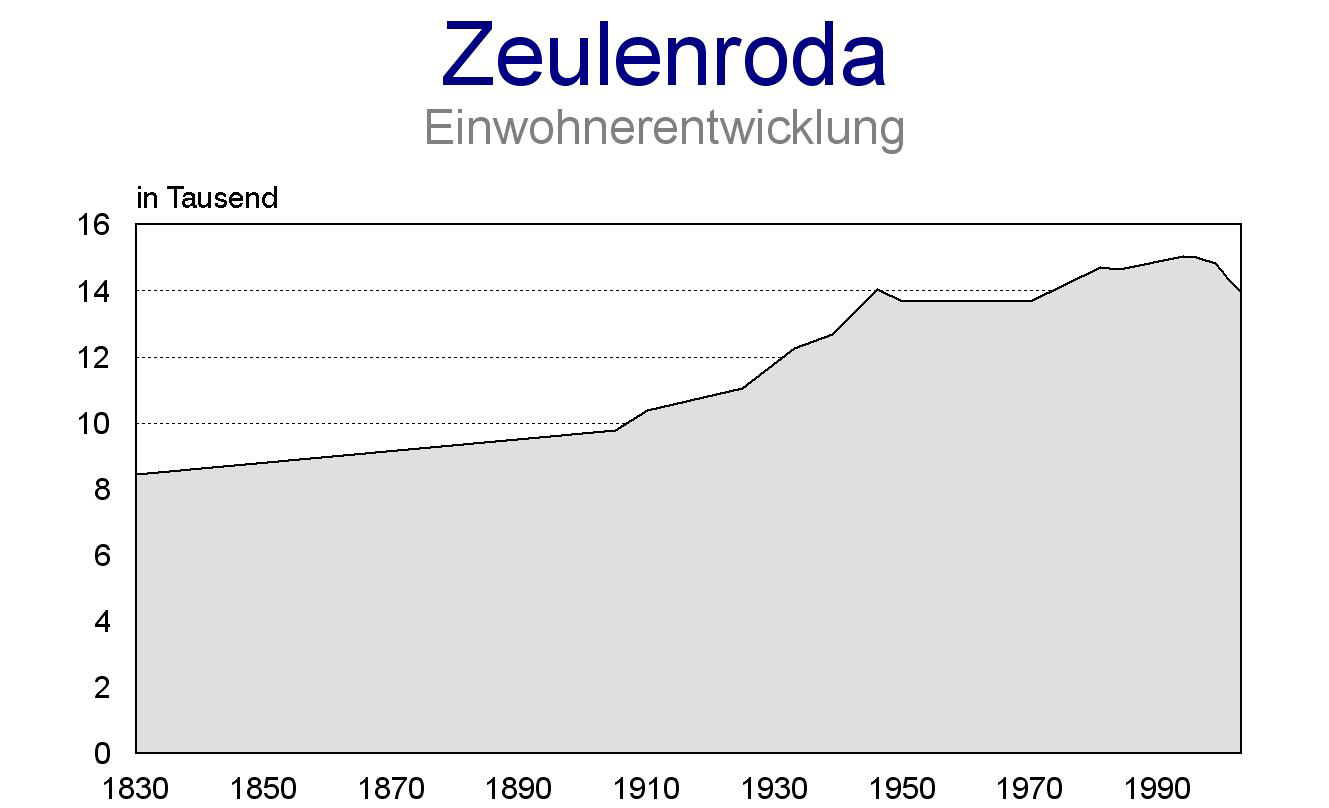 Einwohnerentwicklung von Zeulenroda. Datenreihe: 1830 - 8.449 1905 - 9.776 1910 - 10.389 1925 - 11.047 1933 - 12.247 1939 - 12.688 1946 - 14.039 1950 - 13.694 1960 - 13.684 1970 - 13.687 1981 - 14.709 1984 - 14.659 1994 - 15.044 1995 - 15.021 1996 - 15.026 1997 - 14.959 1998 - 14.906 1999 - 14.826 2000 - 14.600 2001 - 14.358 2002 - 14.158 2003 - 13.961